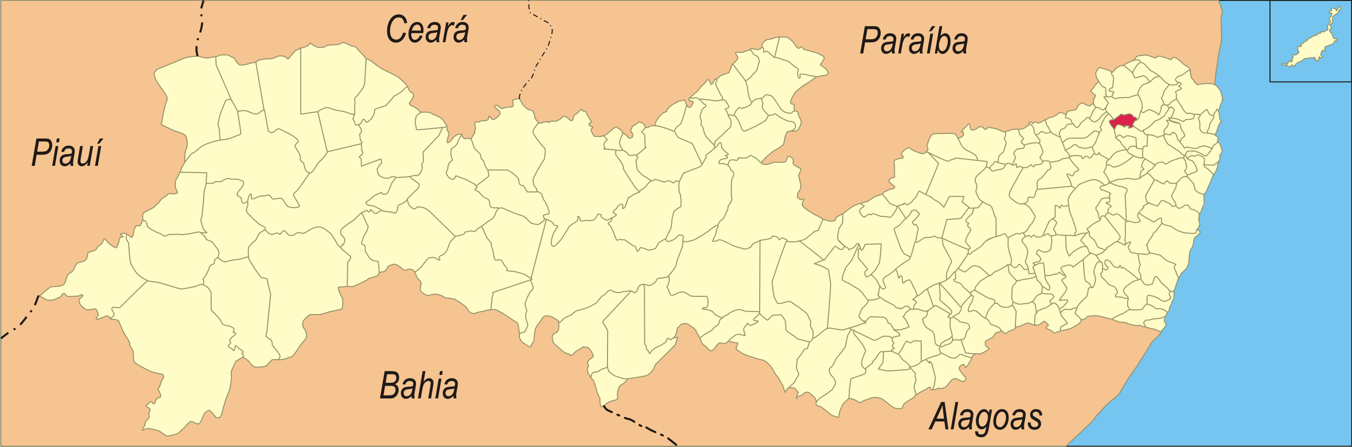 Localização da cidade no estado de Pernambuco